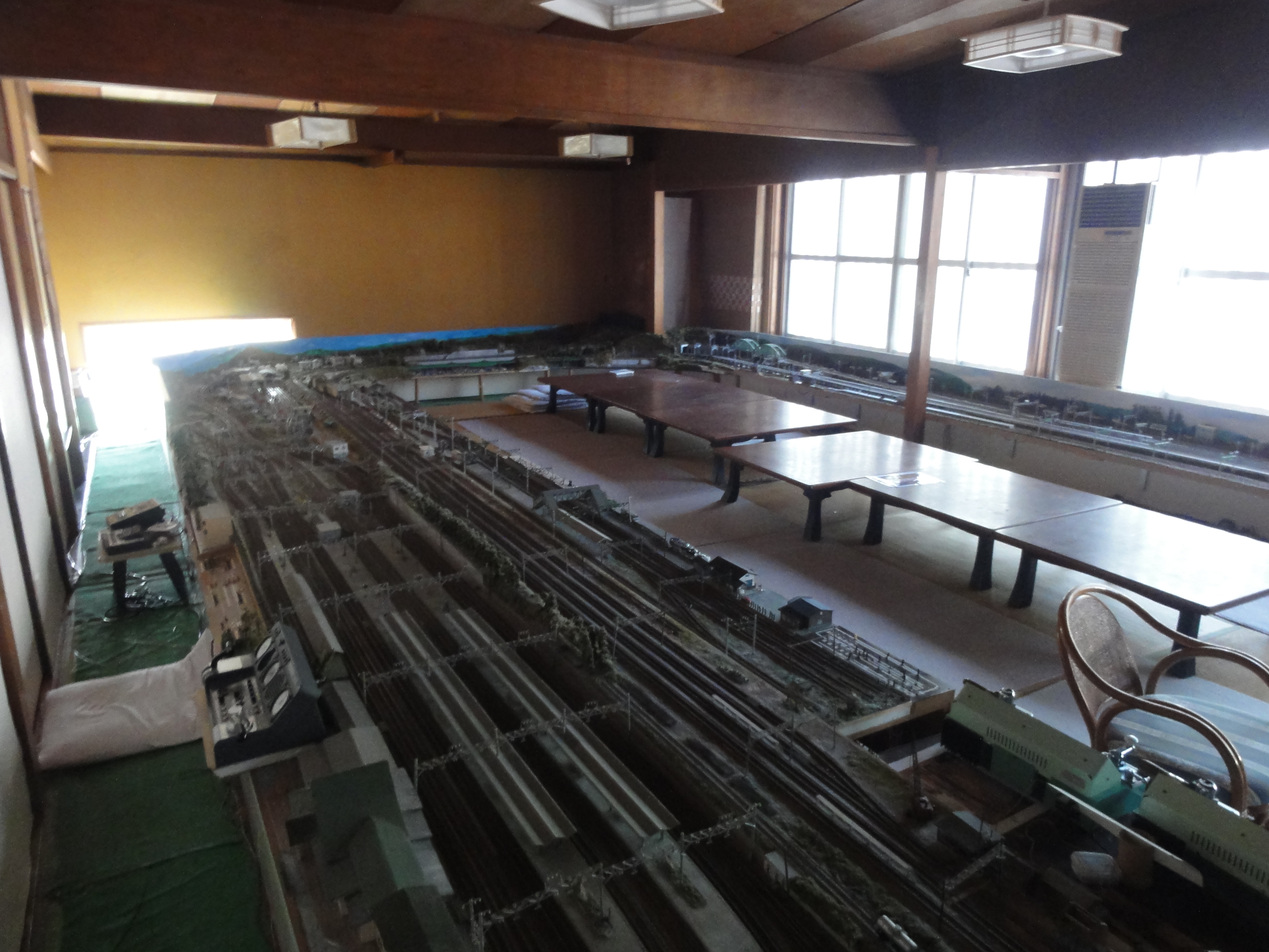 花月園 (旅館) 2F大広間のHOゲージのレイアウト